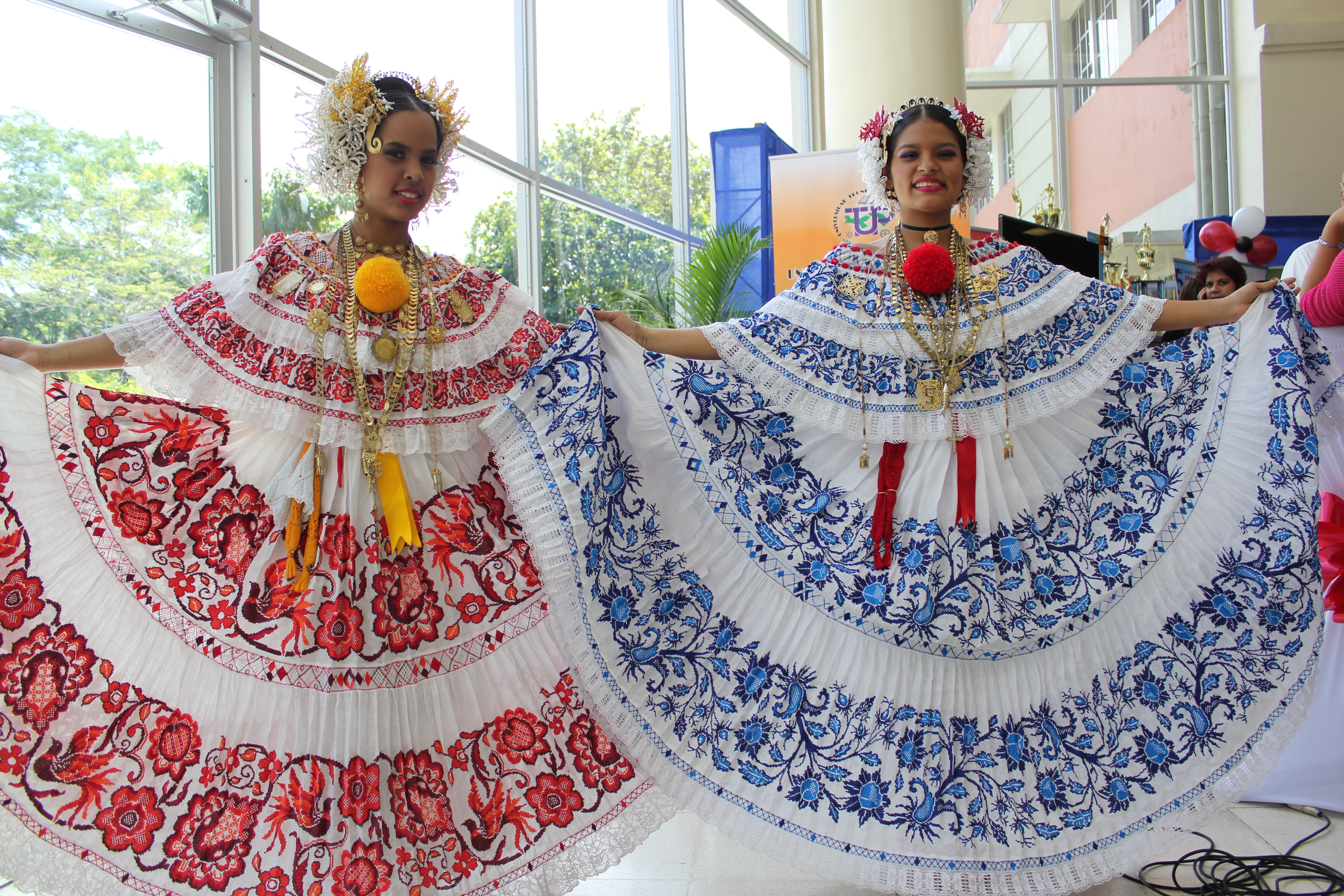 Empolleradas Panameñas luciendo la Pollera, traje típico nacional en Panamá. Ambas polleras bordadas con la técnica del marcado en color rojo y azul.